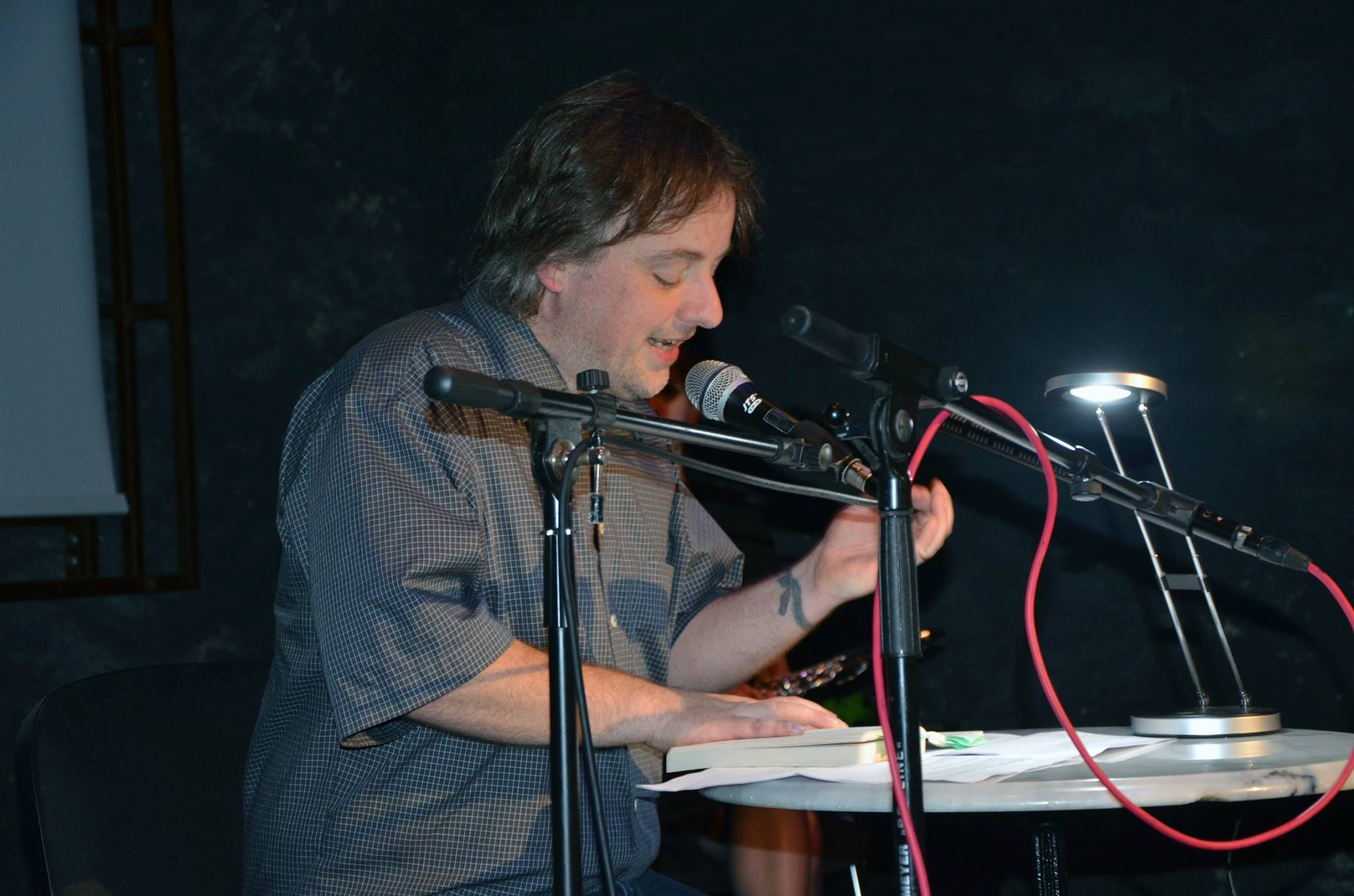 Der österreichische Autor Wilhelm Kuehs bei einer Lesung in Völkermarkt